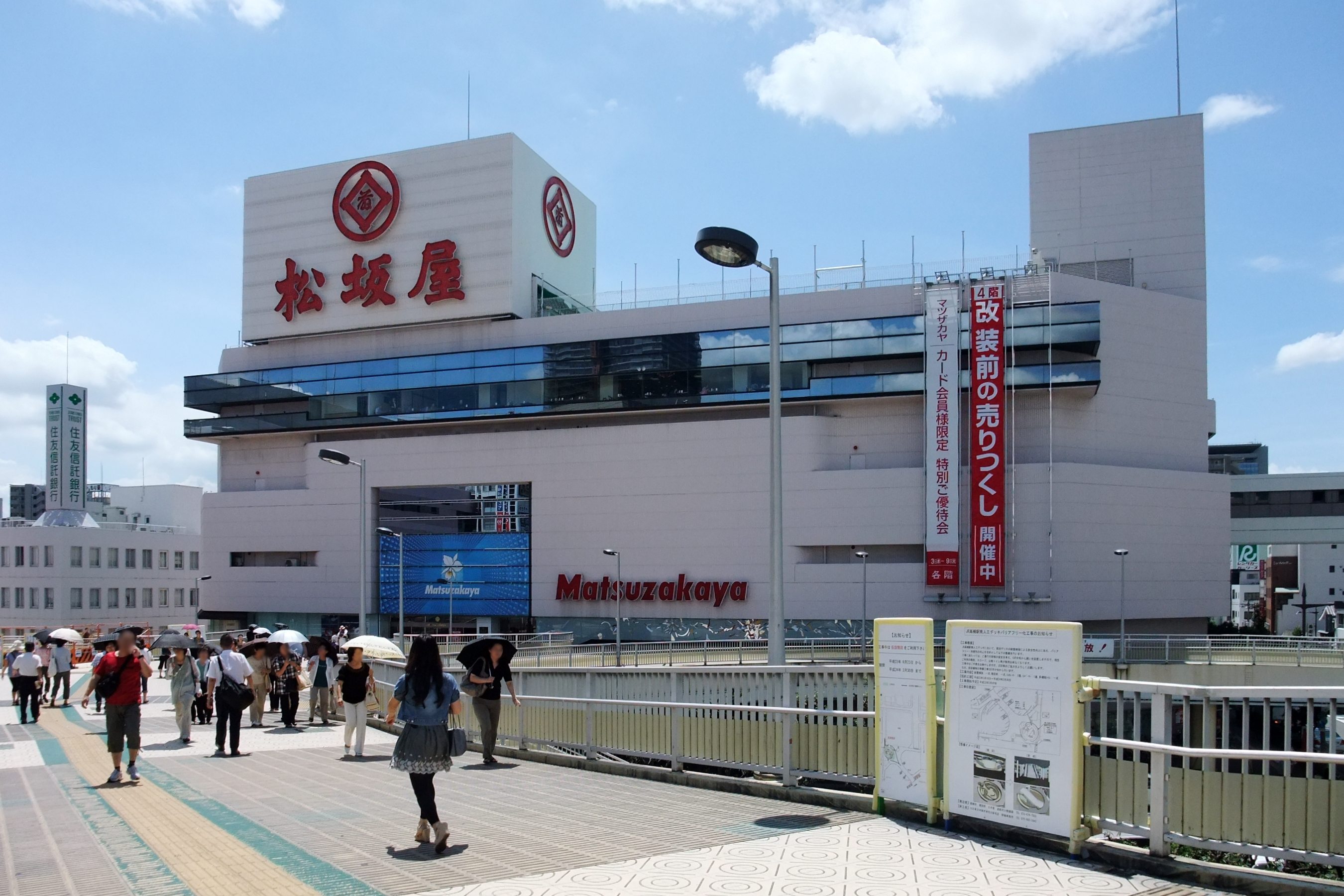 Matsuzakaya in Takatsuki, Osaka prefecture, Japan